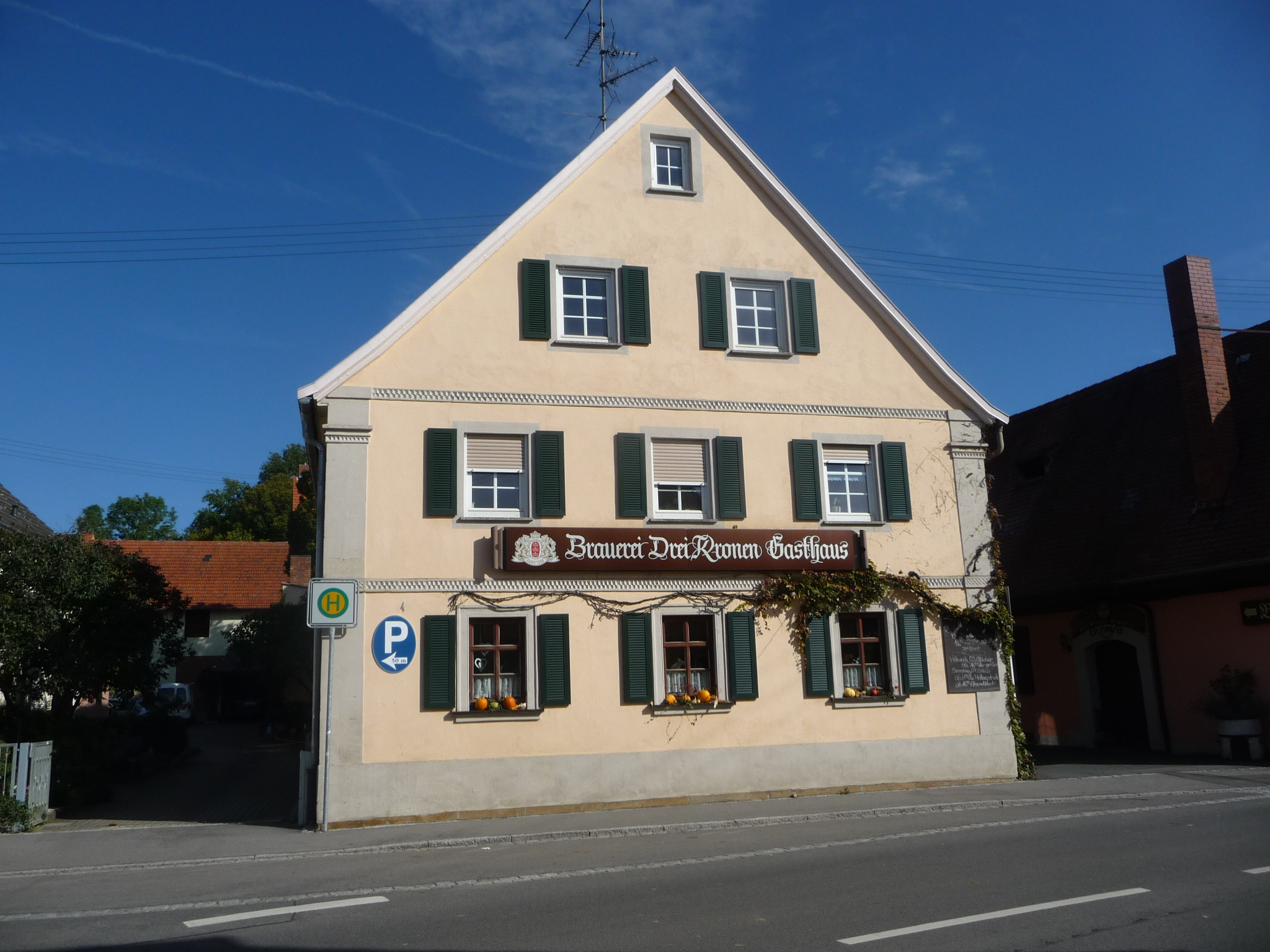 Straßgiech ist ein Stadtteil von Scheßlitz im Landkreis Bamberg, Bayern.